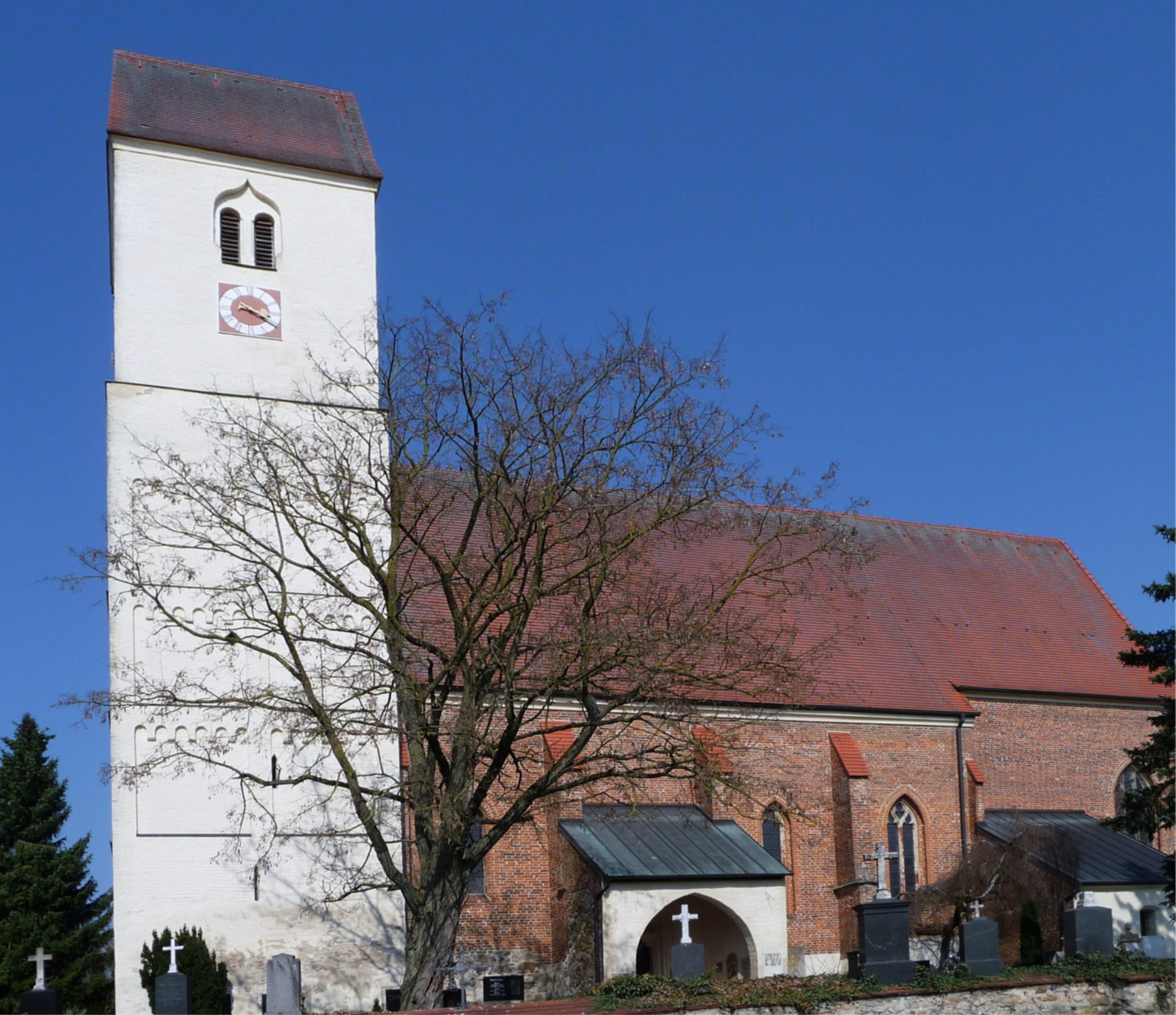 Die evangelische Laurentiuskirche in Steinkirchen, Gemeinde Ortenburg